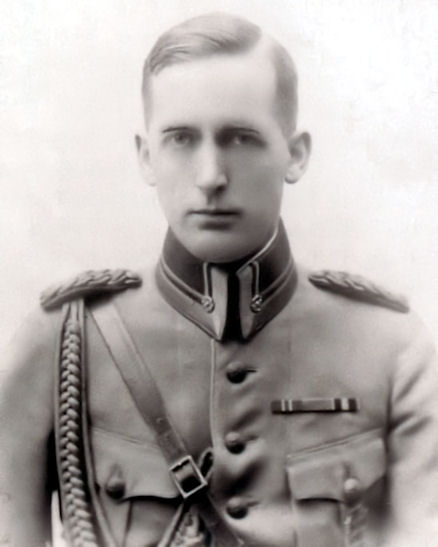 3. Divisioonan komentaja Auno Kaila